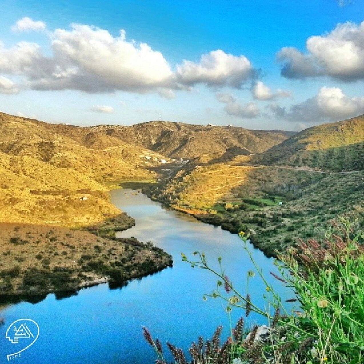 سد وادي الصدر ببني حسن